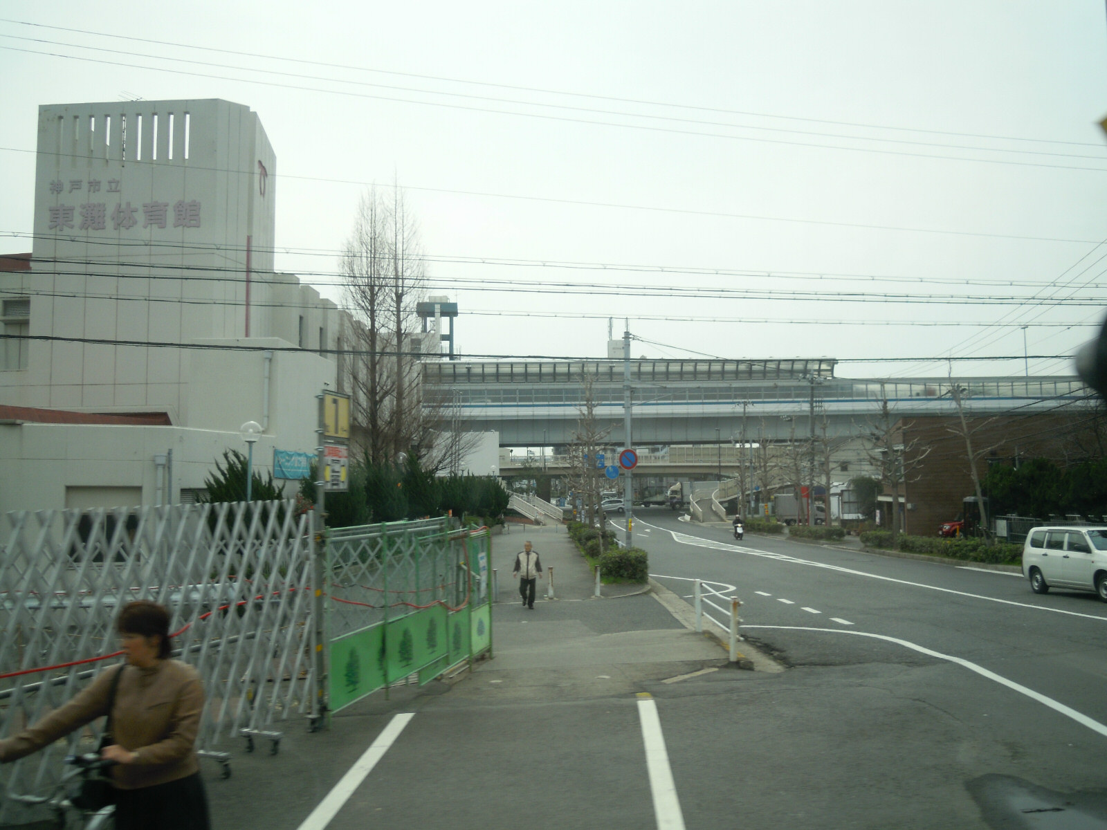 Uozaki Minamimachi